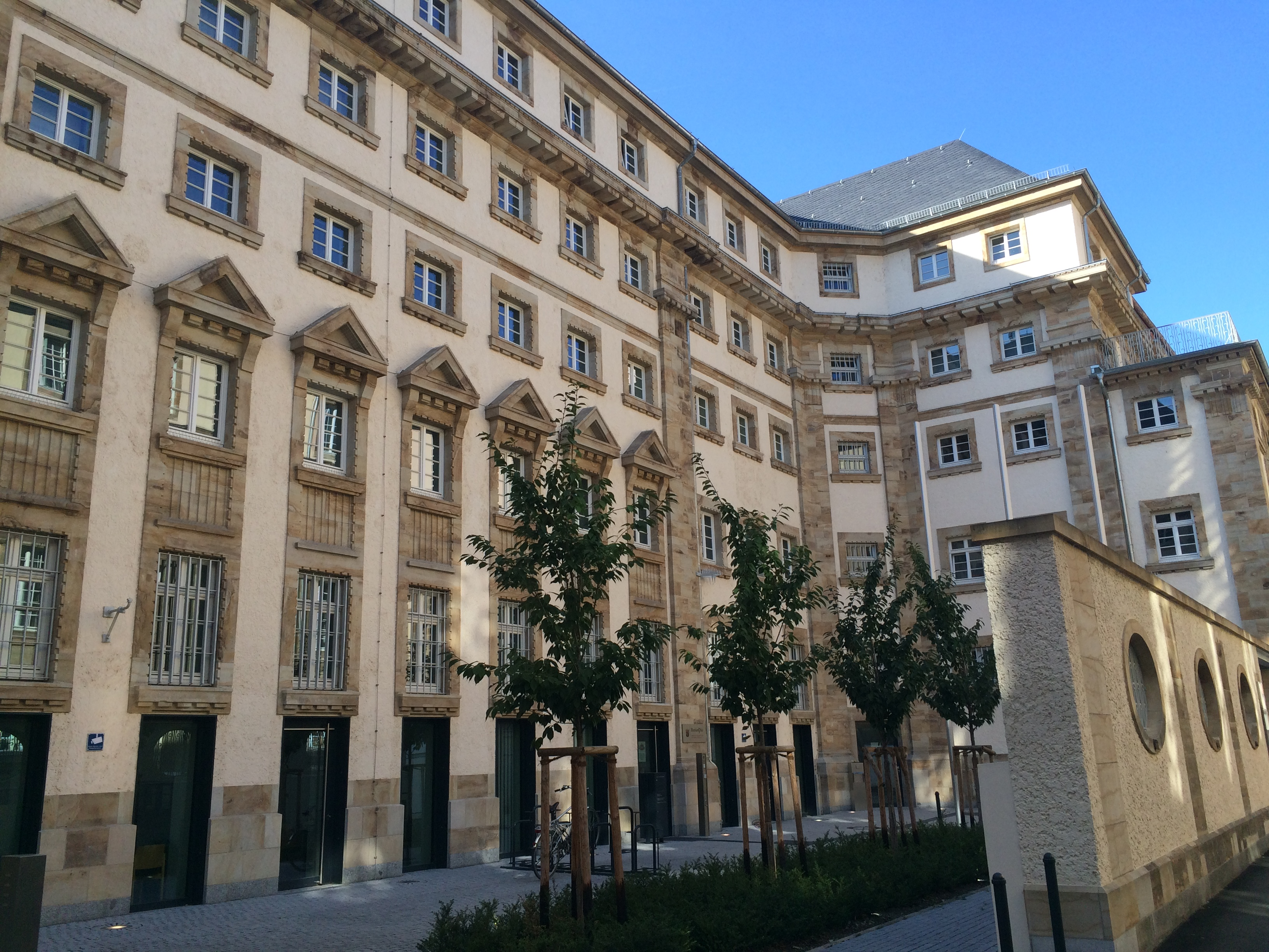 Ministerium der Justiz und für Verbraucherschutz Rheinland-Pfalz im „Isenburg Karree“, Mainz. Bezug nach Sanierung der Bestandsgebäude, Umbau und Umnutzung der ehemaligen Justizvollzugsanstalt Mainz, erbaut um 1908 auf dem damaligen Schloßplatz nach Entwürfen der Stuttgarter Architekten Paul und Karl Bonatz. Rechtwinkliges, 2-flügeliges Gebäude-Ensemble mit Gründerzeitfassade, um den ehemaligen Gefängnishof gruppiert.